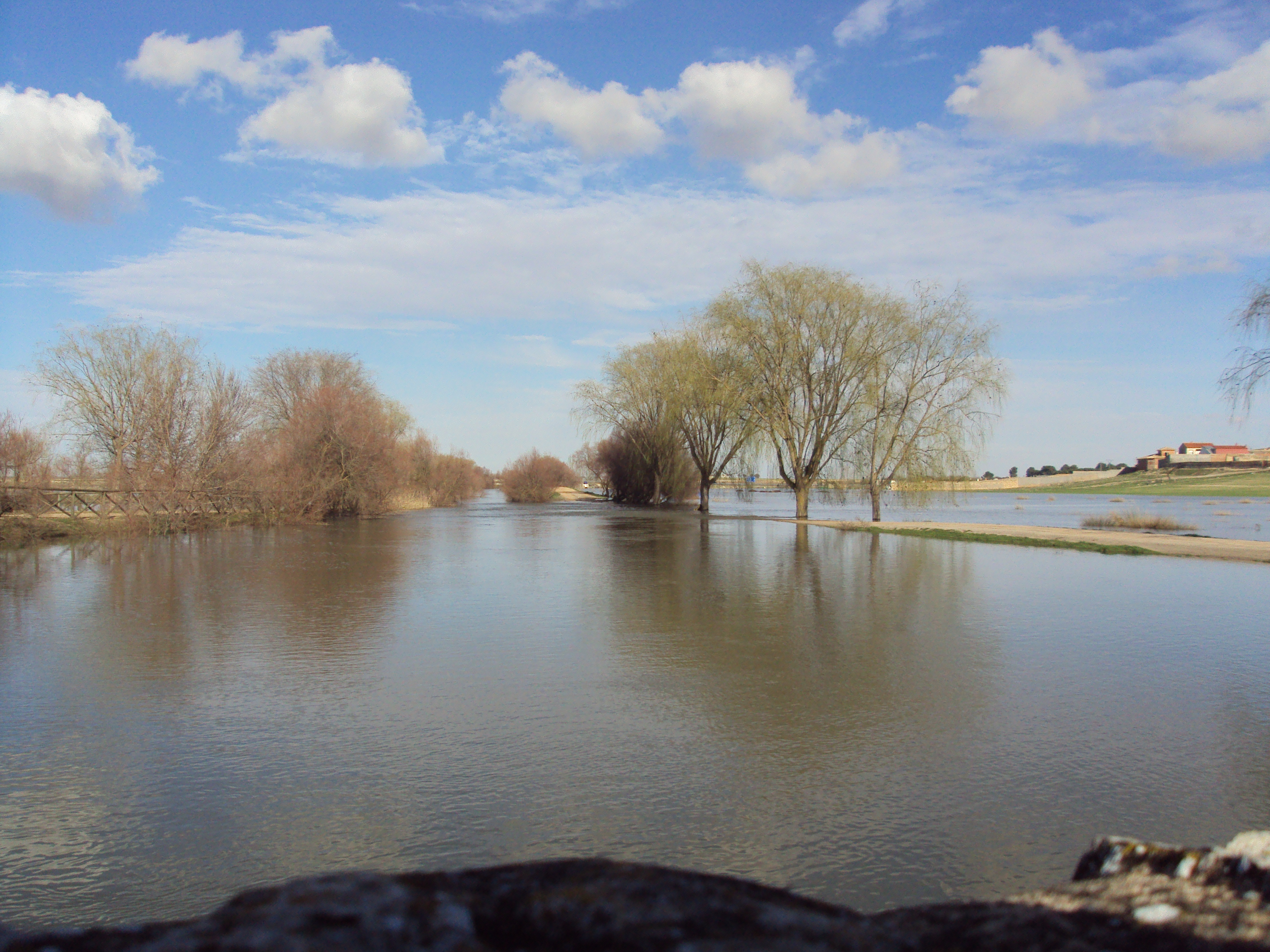 Rio Ciguela a su paso por villarta de san juan, se ve el cauce artificial de los años sesenta desbordado por las lluvias de los ultimos meses.